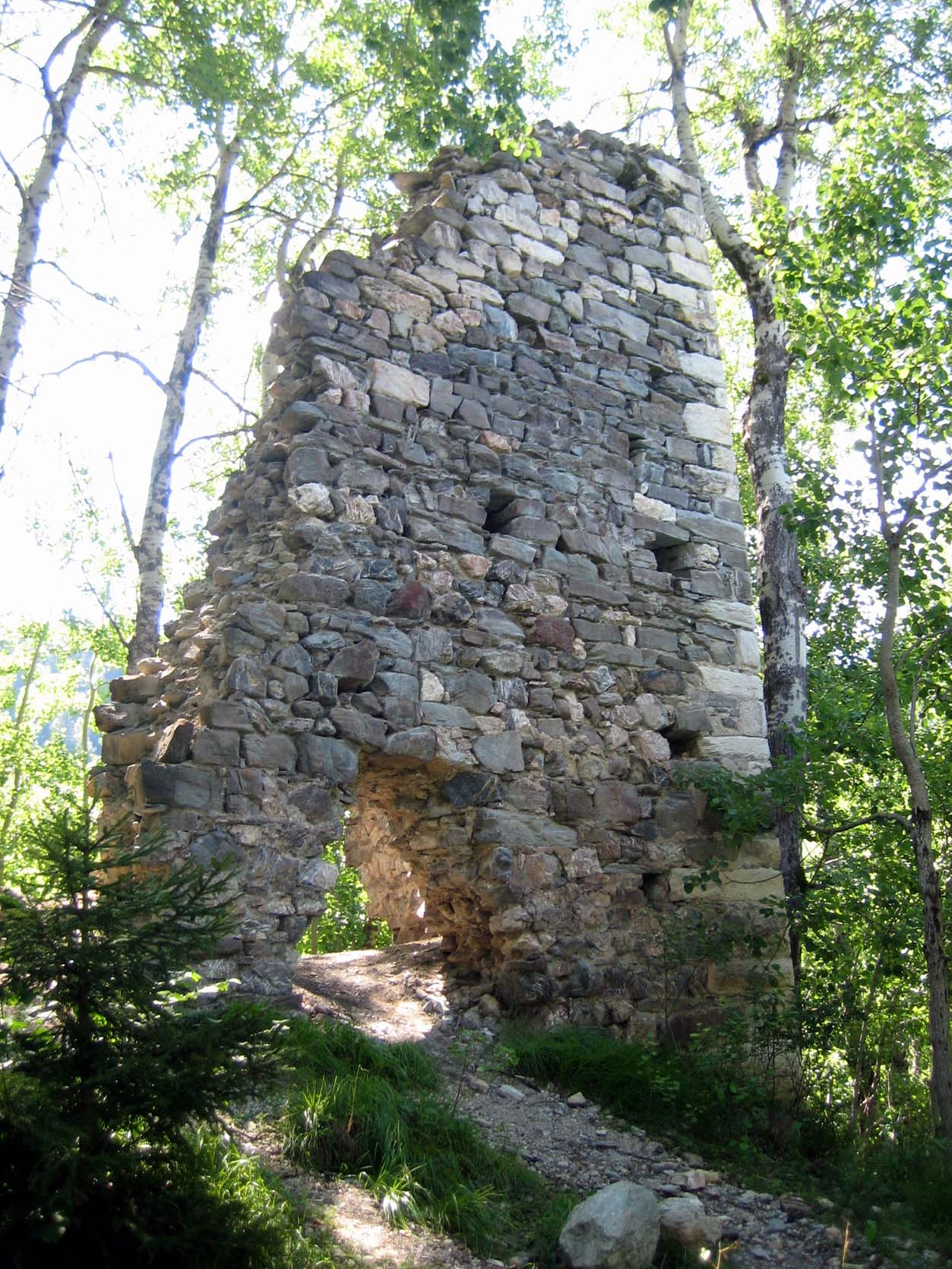 Turm